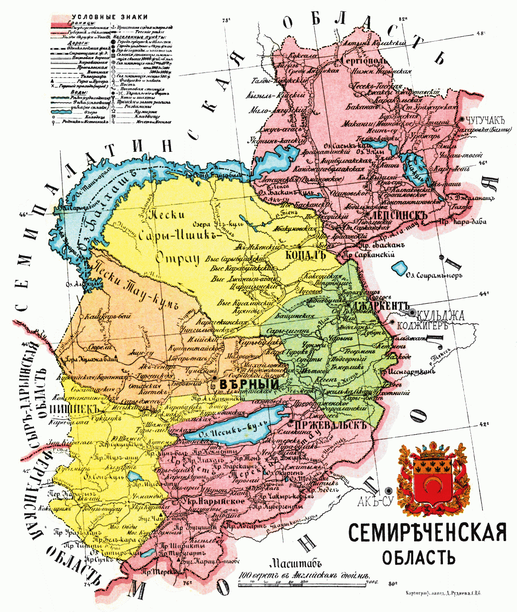 Карта Семиреченской области, 1913